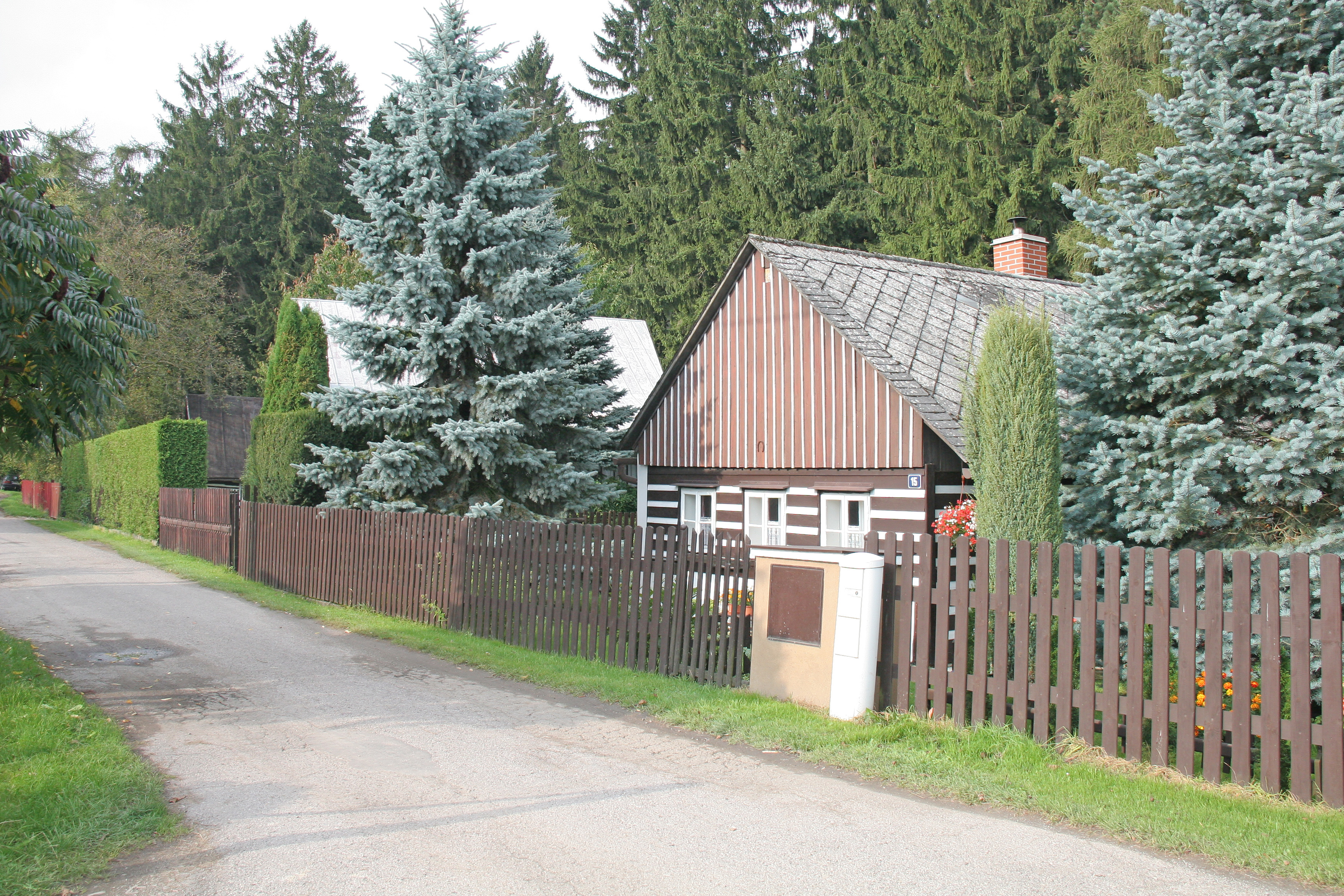 Výhled čp. 15